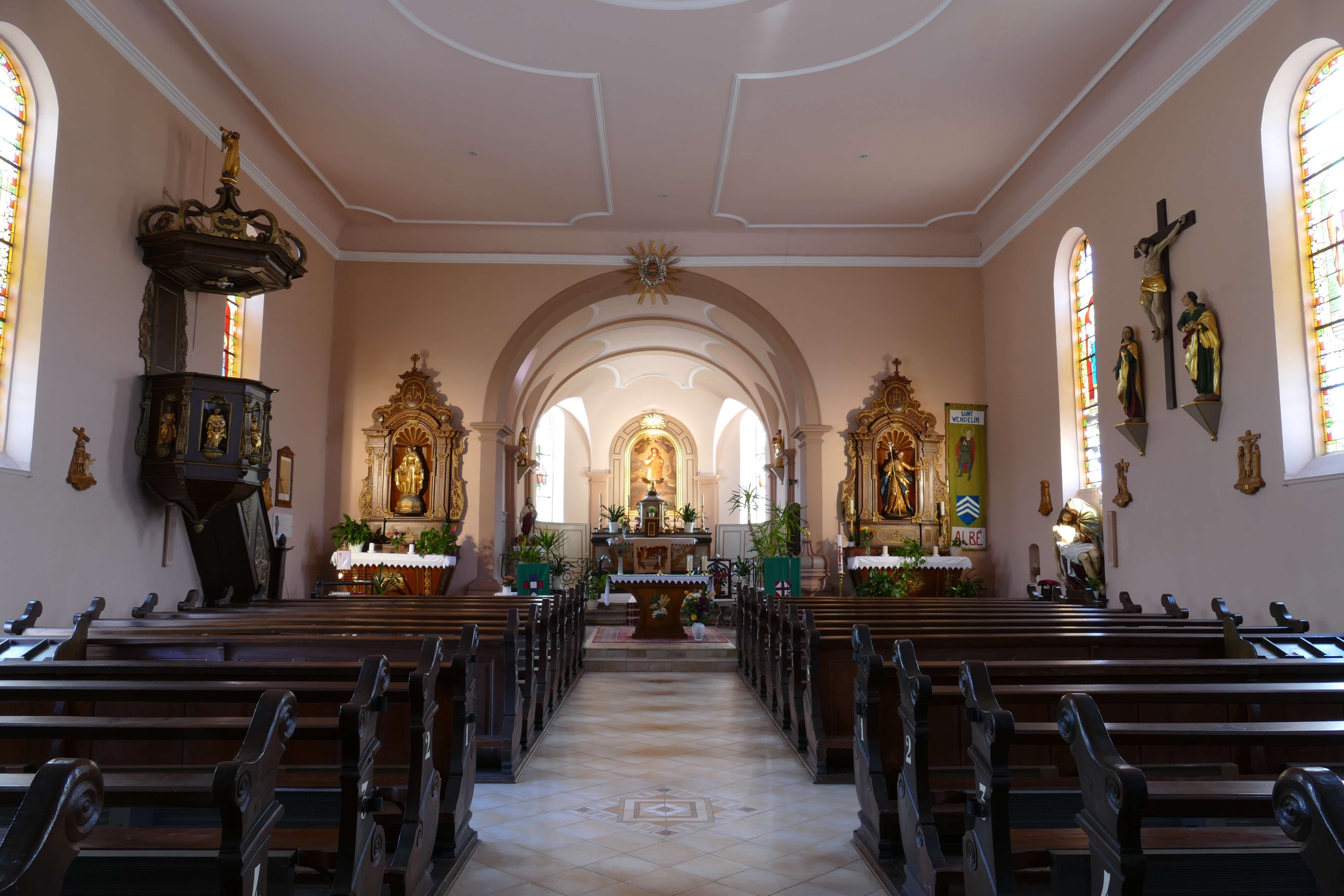 Alsace, Bas-Rhin, Albé, Église Saint-Wendelin (IA67010399). Vue intérieure de la nef vers le chœur. Bancs de fidèles (XVIIIe)